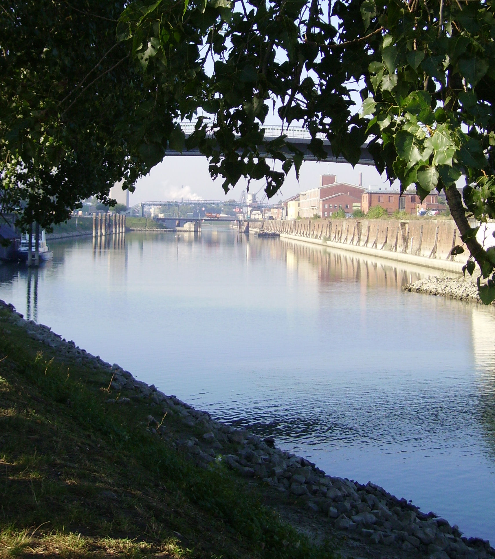 Parkinsel of Ludwigshafen in Rheinland-Pfalz (Germany)